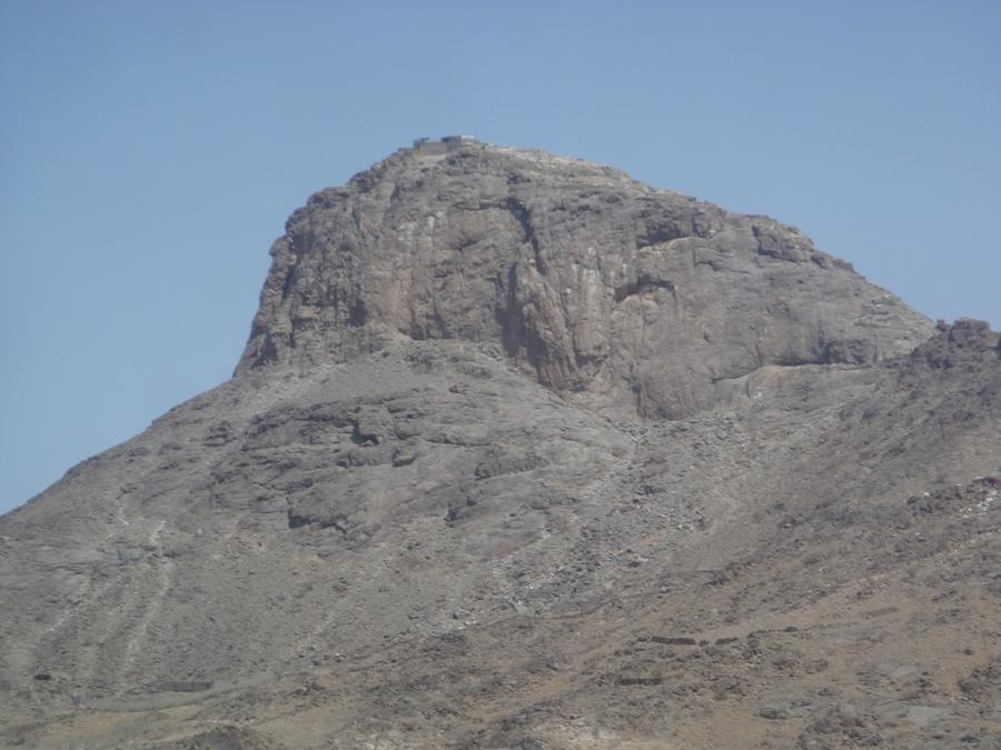 جبل النور في مكة المكرمة